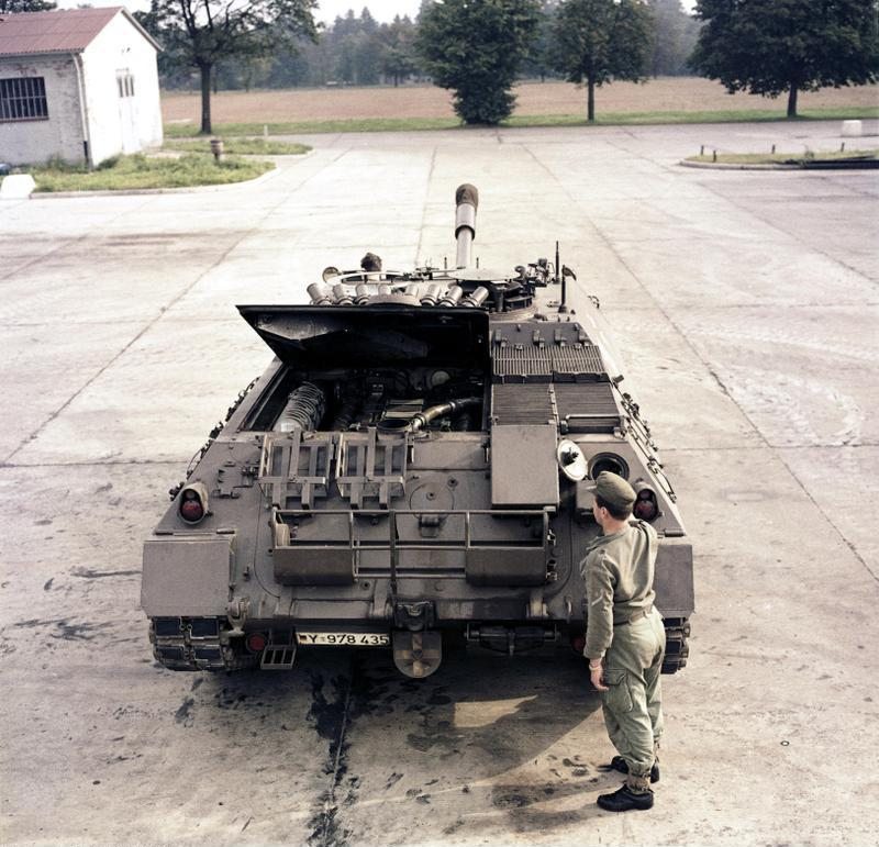 Reportage Bundeswehr Kanonenjagdpanzer, Munsterlager, KTrS III [Munsterlager, Truppenübungsplatz in der Lüneburger Heide]